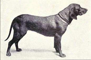 Bavarian Limer from 1915